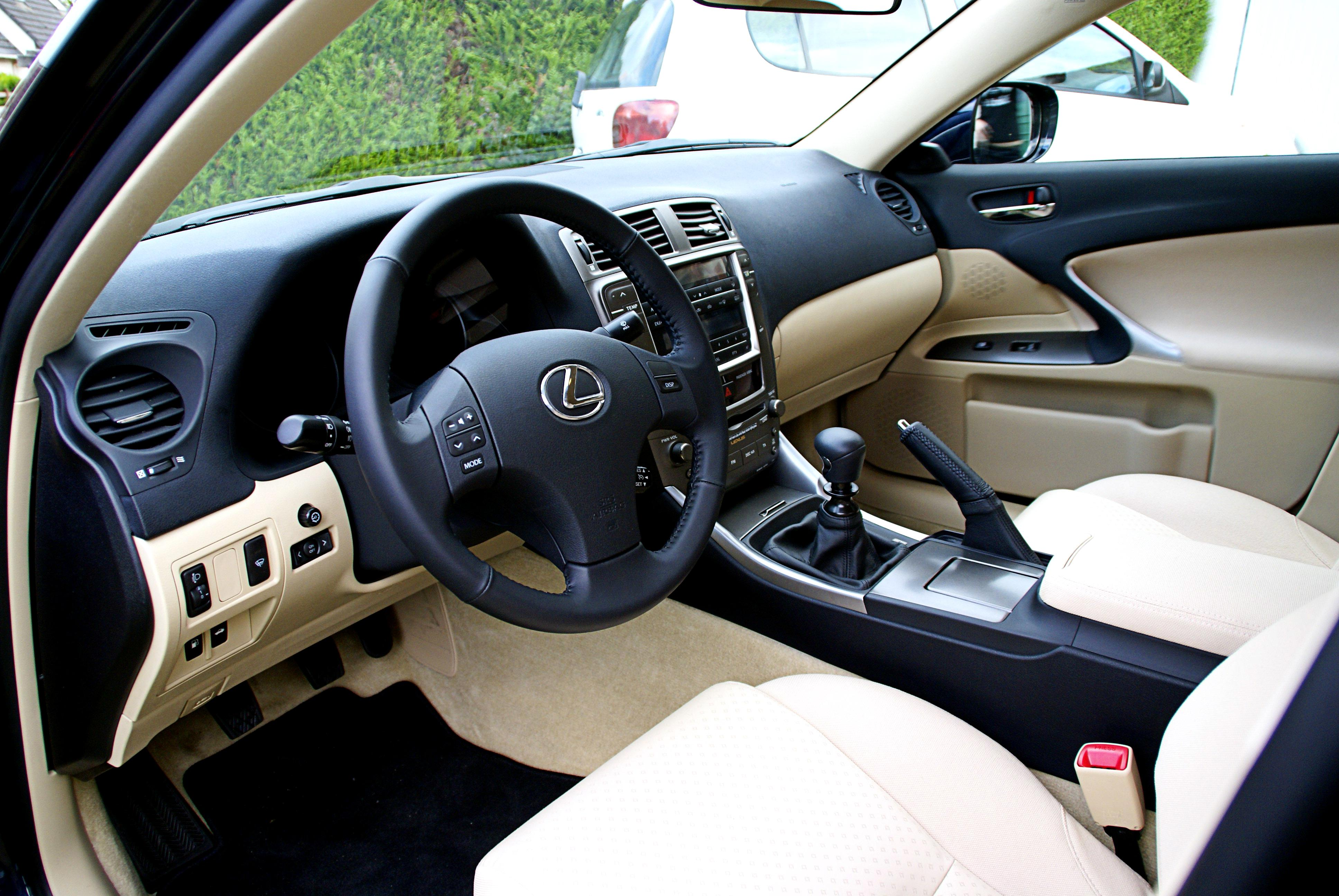 Lexus IS220D version Pack (vue intérieure). Photo prise chez moi à Tours (Indre et Loire), juste après livraison de ma voiture.